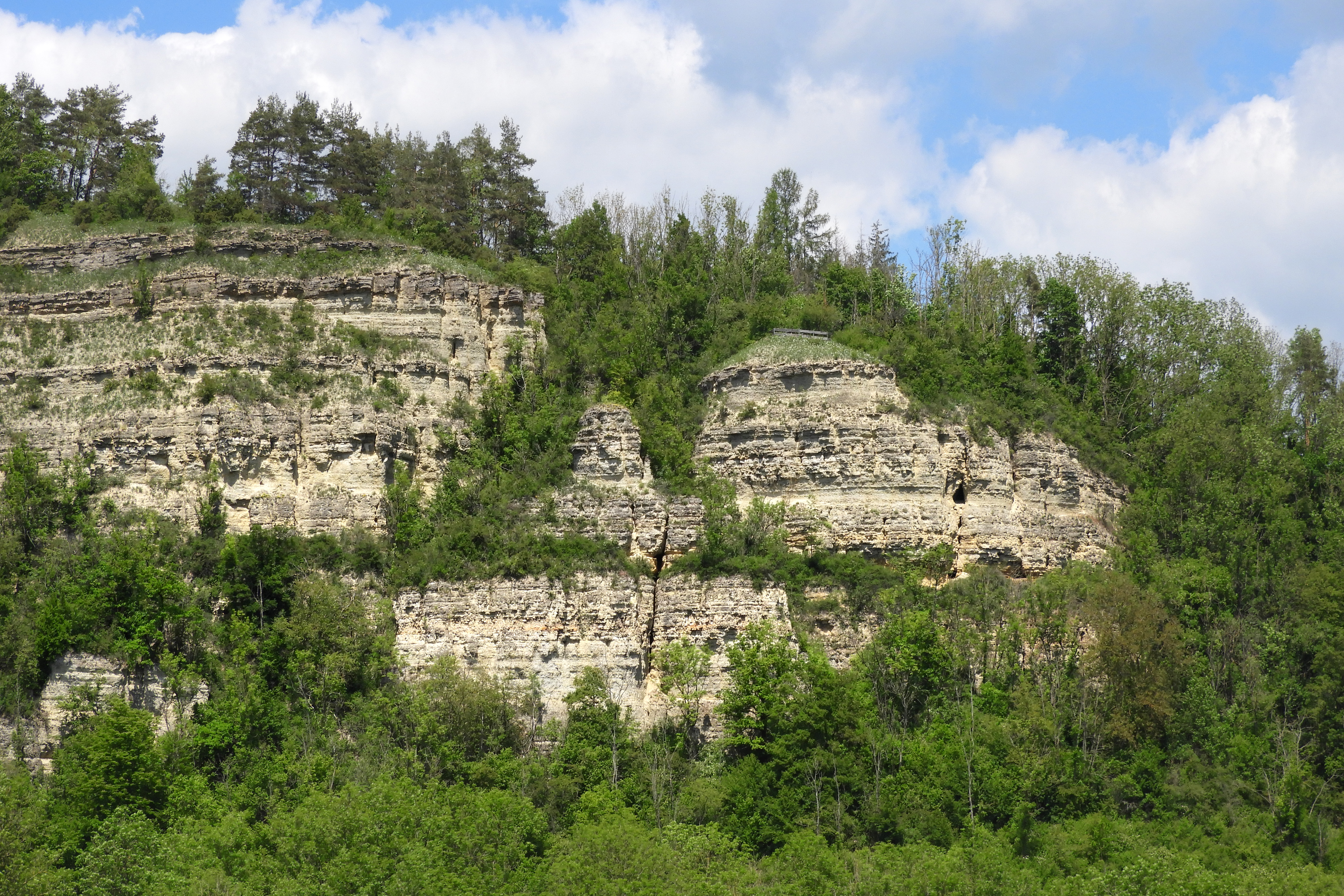 Die Ebenauer Köpfe gehören zum Naturschutzgebiet „Ebenauer Köpfe und Wisch“ und zum Flora-Fauna-Habitat-Gebiet „Creuzburger Werratal-Hänge“ im westthüringischen Wartburgkreis. Das Naturschutzgebiet hat die thüringeninterne Kennung 64 und den WDPA-Code 162830. Das FFH-Gebiet hat in Thüringen die Nummer 35, die europäische Gebietsnummer 4927-303 und den WDPA-Code 555520295.